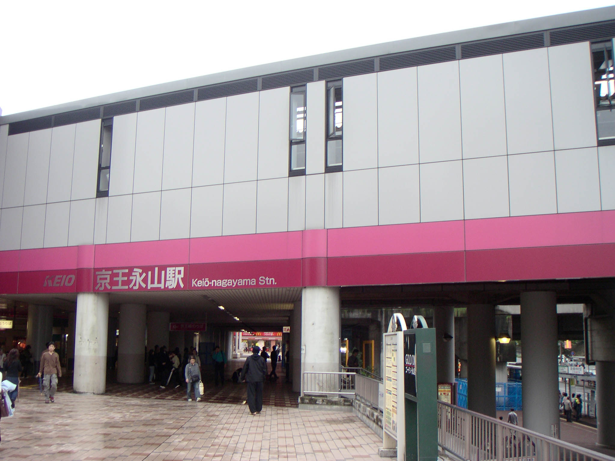 Keionagayama Station